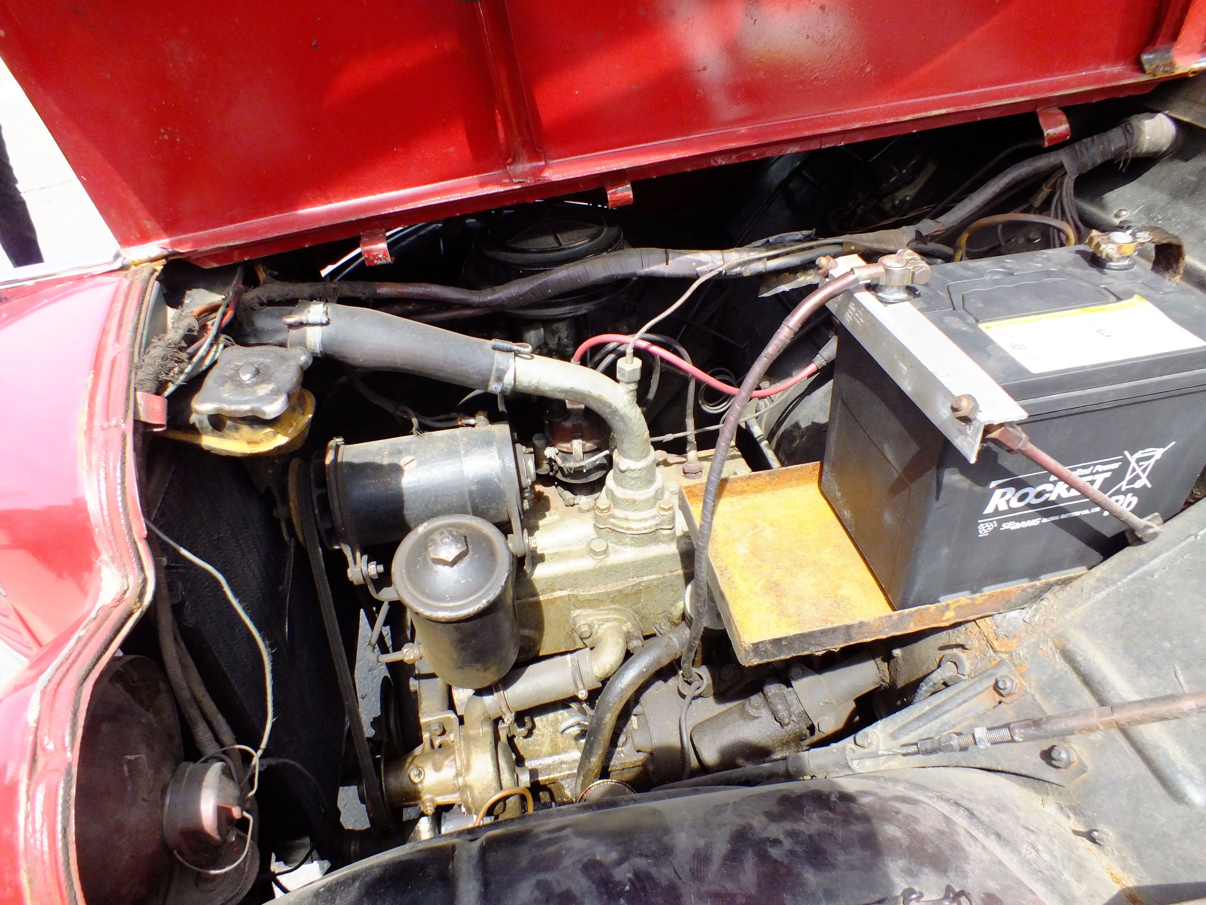 Moskvich 400